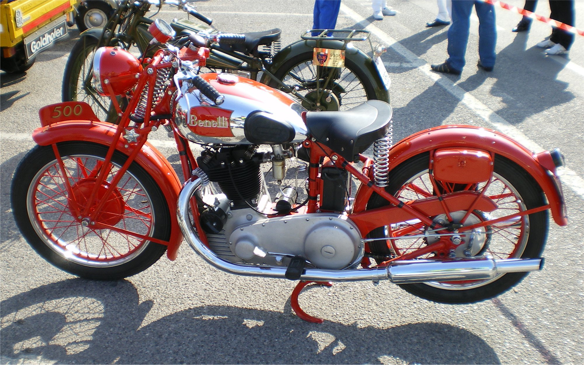 Benelli 500 Turismo del 1939 fotografata al Raduno Moto Storiche di Medole nel 2008